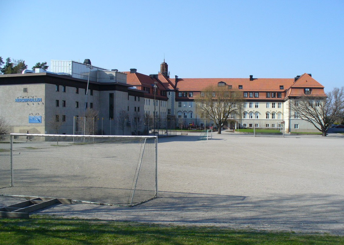 Hersby skola, Lidingö.